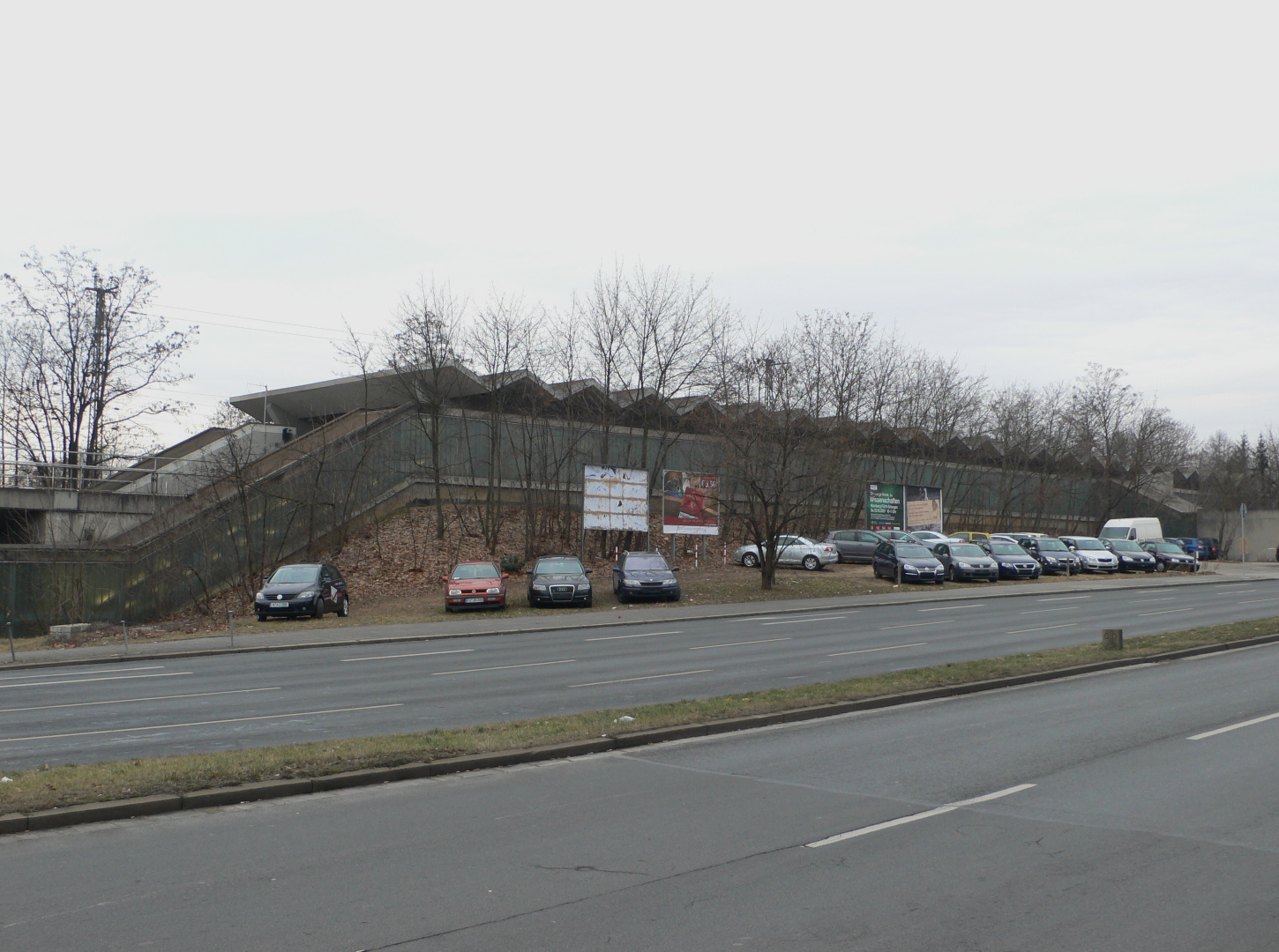 U-Bahnhof Stadtgrenze der U-Bahn Nürnberg, Außenansicht, Blick von Nordosten